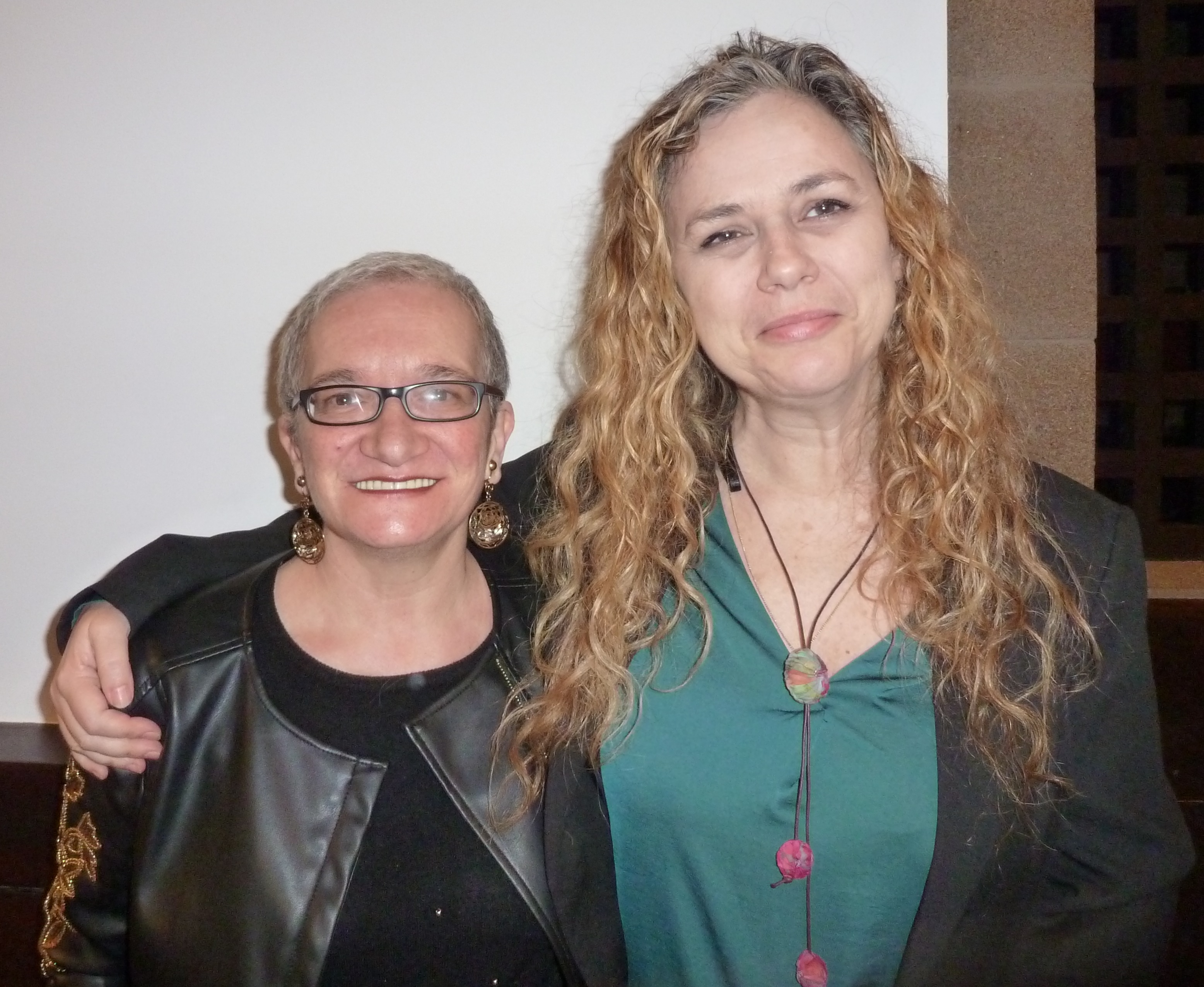 A escritora Isabel Blanco e a ilustradora Luz Beloso na Casa das Campás de Pontevedra